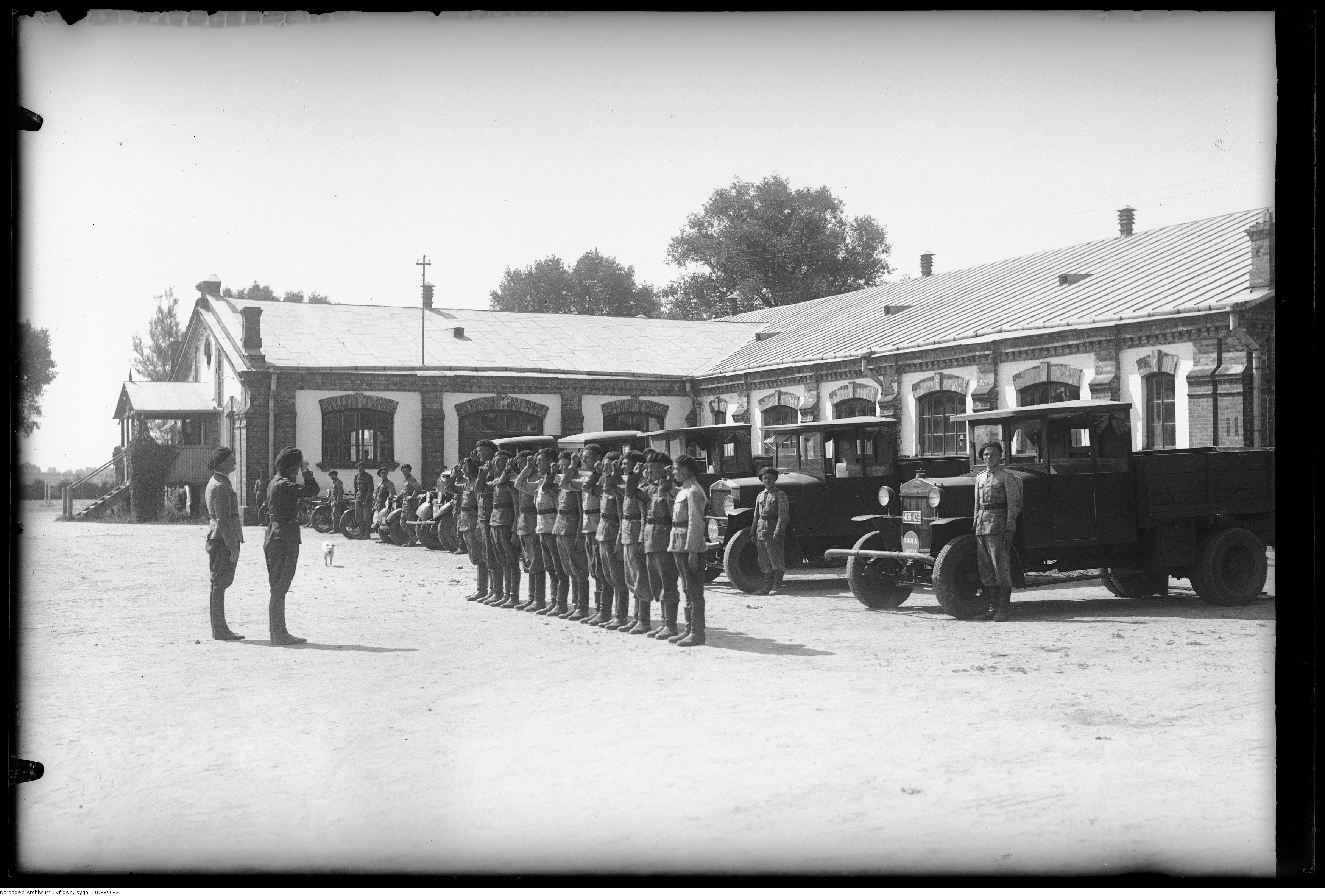 Odprawa instruktorów przed sprzętem (salutują).